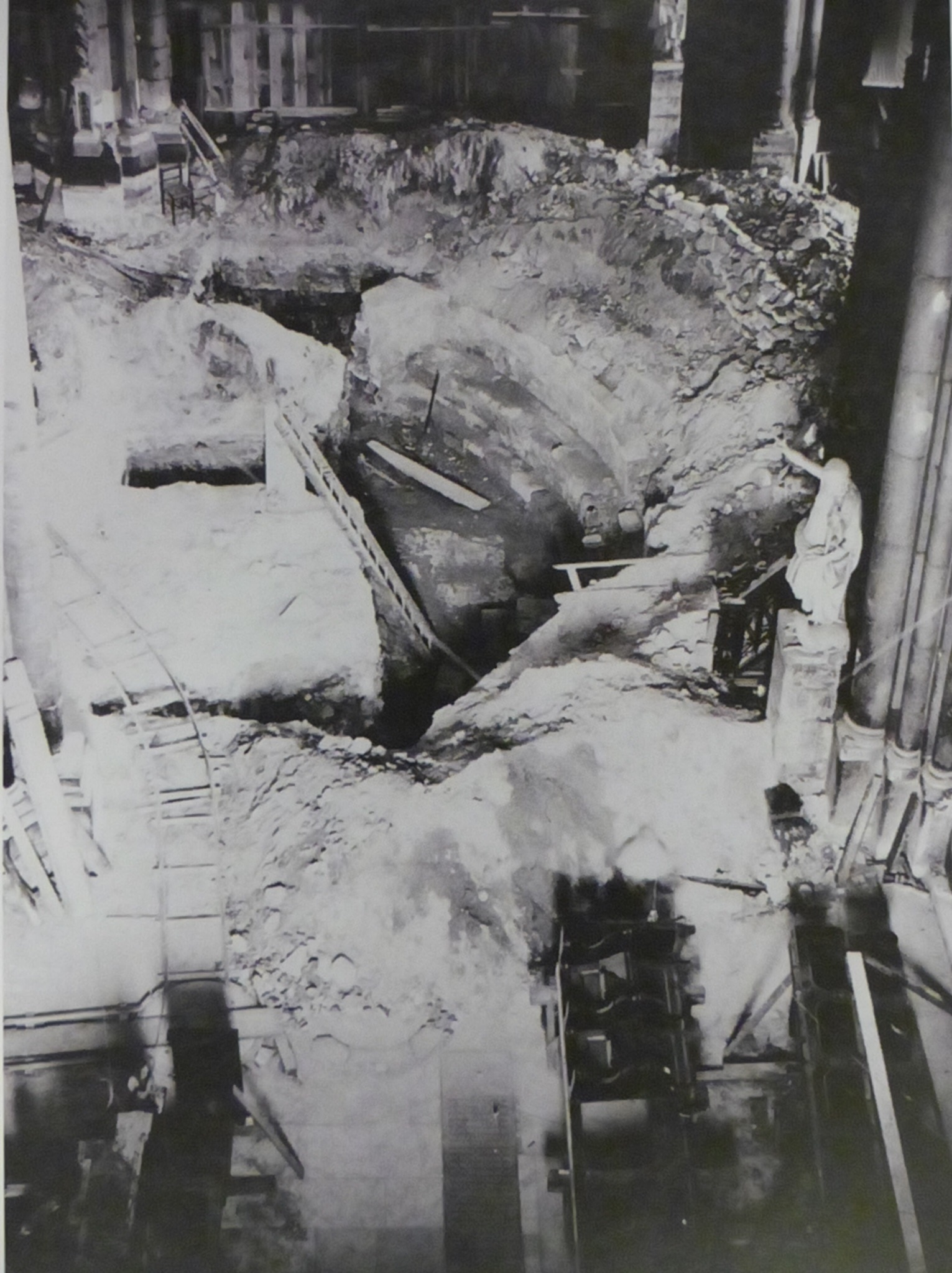 Travaux de 1936 dans la primatiale Saint-Jean de Lyon, mettant à jour les fondations de l'ancienne basilique (détruite à partir de 1175).